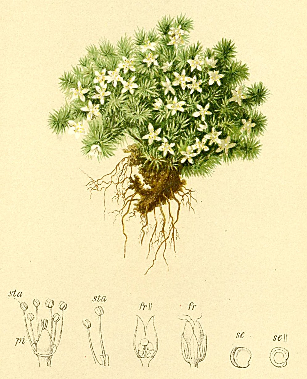 Minuartia sedoides (Alsine sedoides)